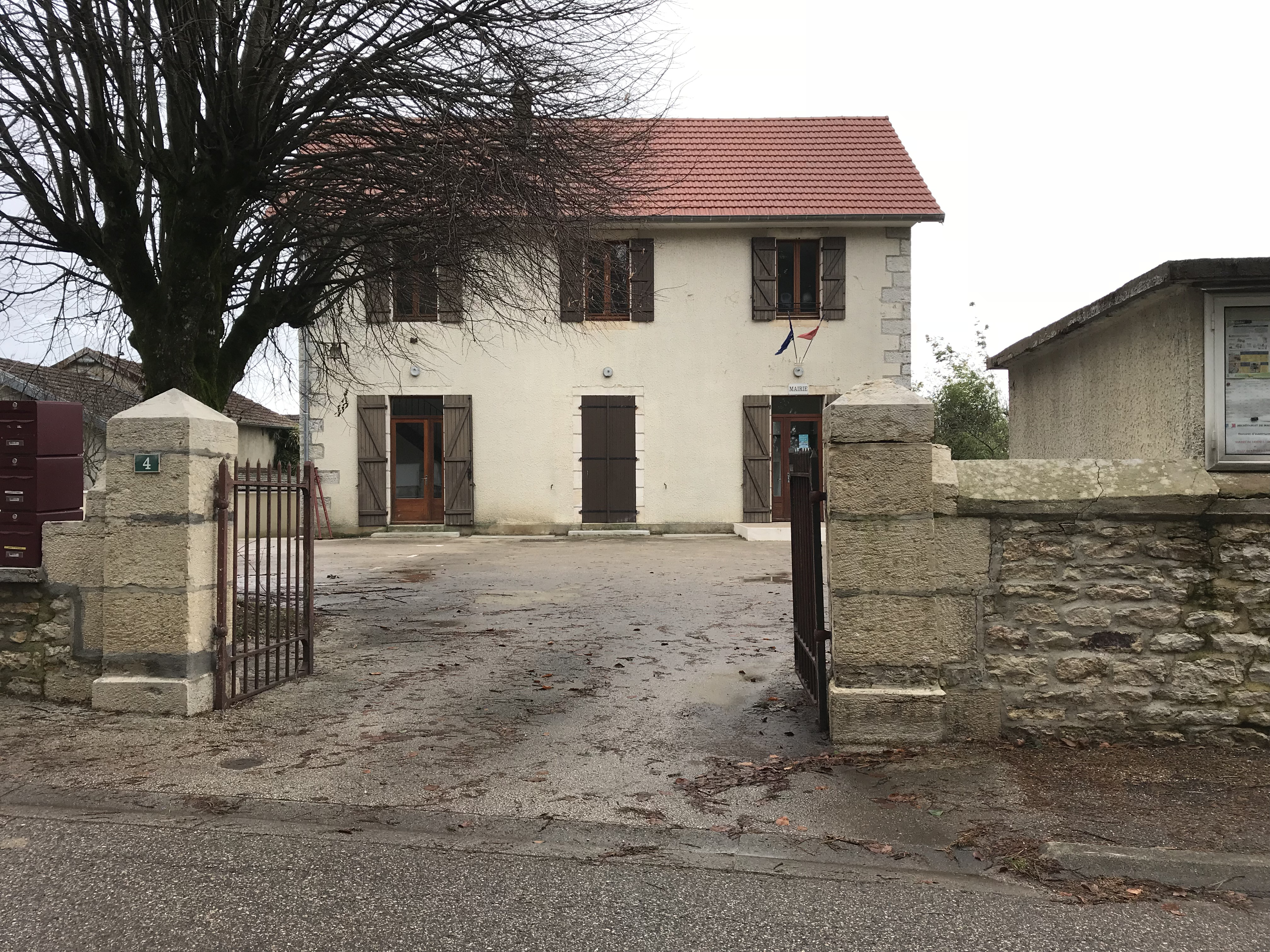 Image de Germigney (Jura) en janvier 2018.